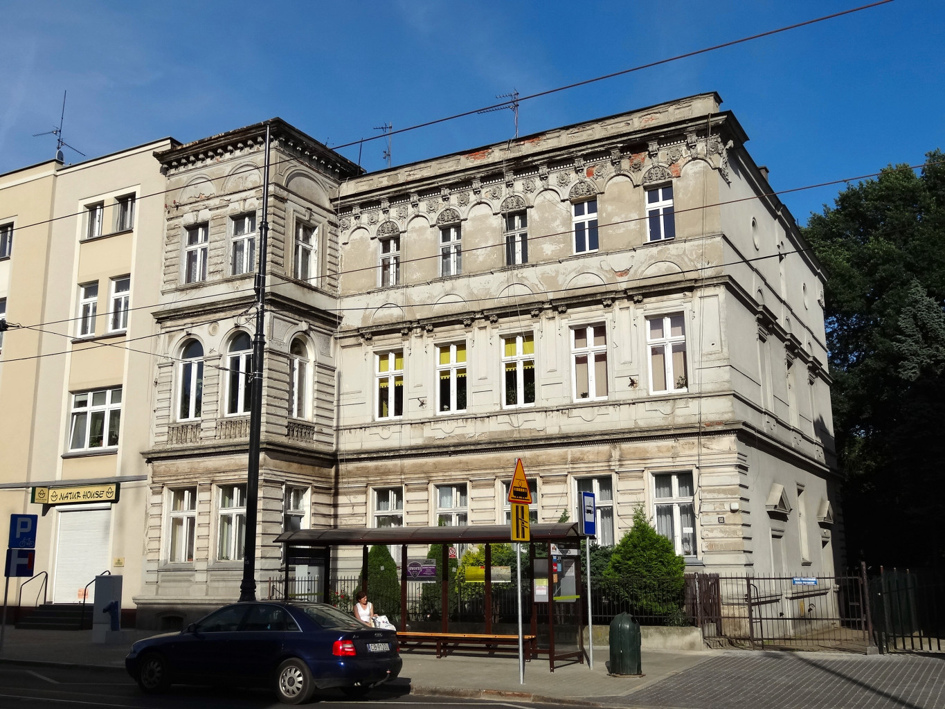 Kamienica przy ul. Gdańskiej 96 w Bydgoszczy (1891-1892, aut. Józef Święcicki)